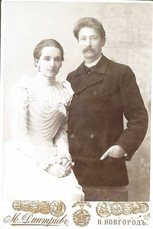 Адам Ягоравіч Багдановіч – бацька Максіма Багдановіча з Аляксандрай Паўлаўнай Волжынай (другой жонкай). г. Ніжні Ноўгарад. 1899 г.